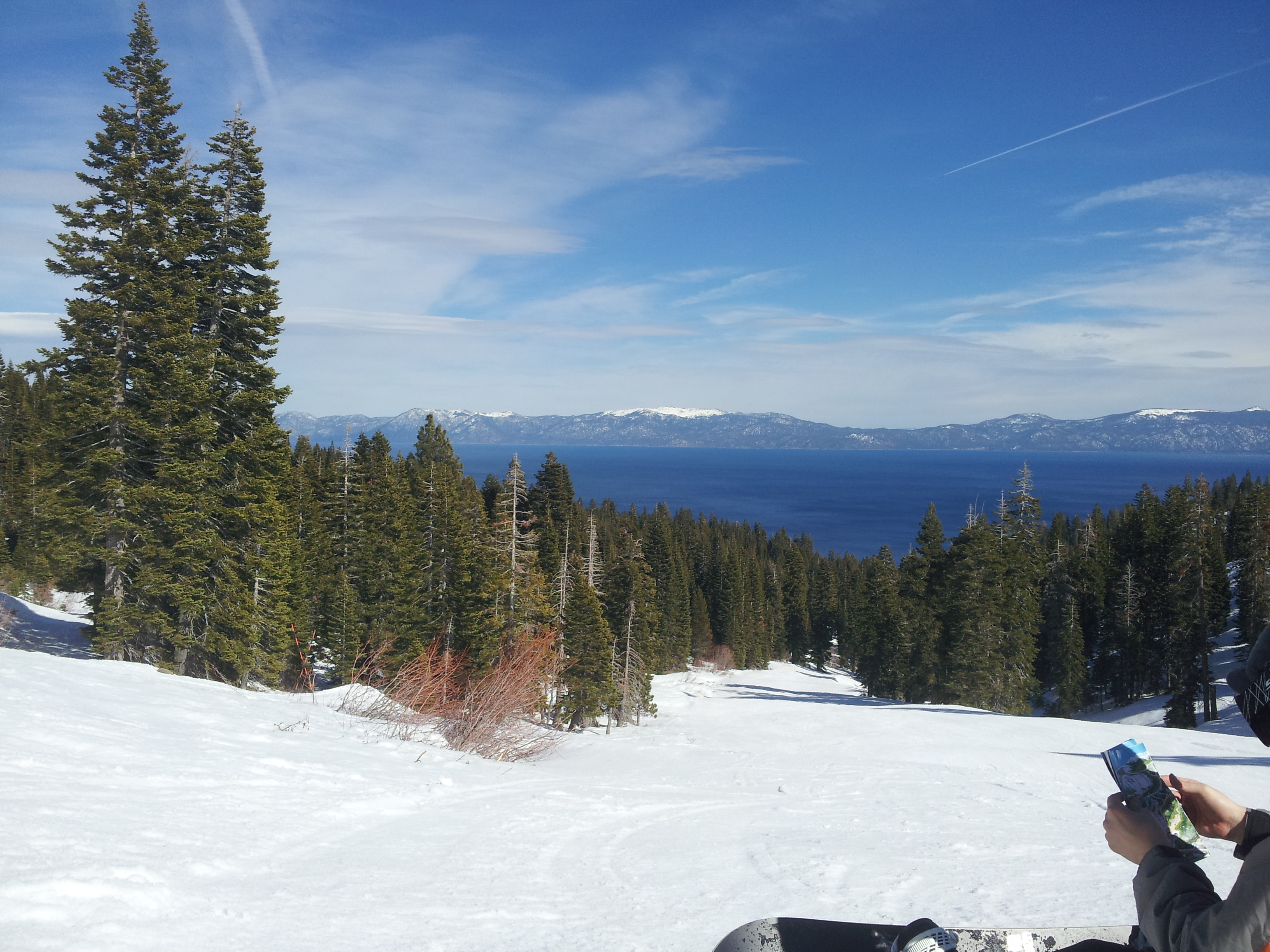 Homewood, CA